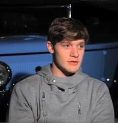 Александар Радојчић српски глумац